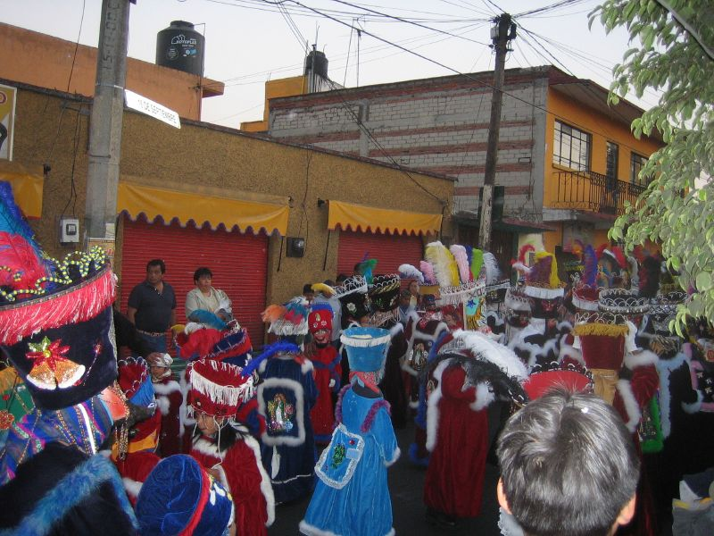 Chinelos, en Xochimilco (México). Aparece en flickr.comcon el título Xochimilco, Mexico City.